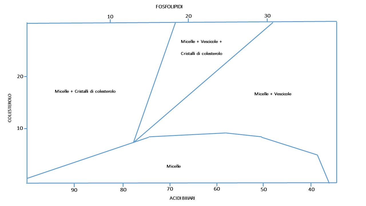 Diagramma modificato da: D. Jungst, J. Lab. Clin. Med. 2004;144:134-140; M.C. Carey, J. Clin. Inv. 1978;61:998-1026.